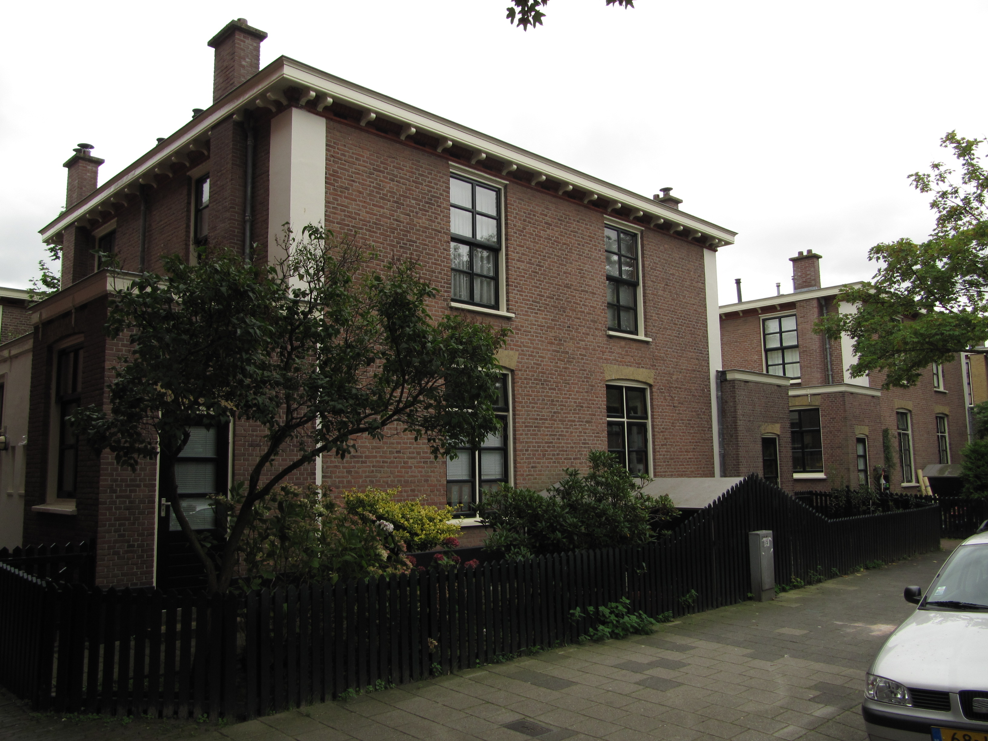 RM459818 Den Haag - Van Hogendorpstraat 52-54 (achter 64-66).jpg